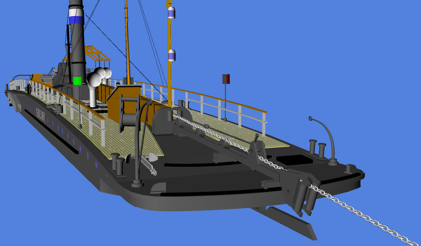 Bugansicht mit Kettenausleger des K.B.K.S. No. V, Konstruktion für einen Kartonmodellbaubogen